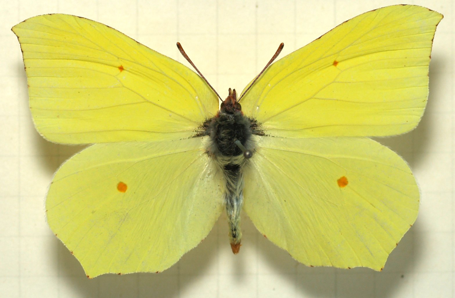 Gonepteryx rhamni